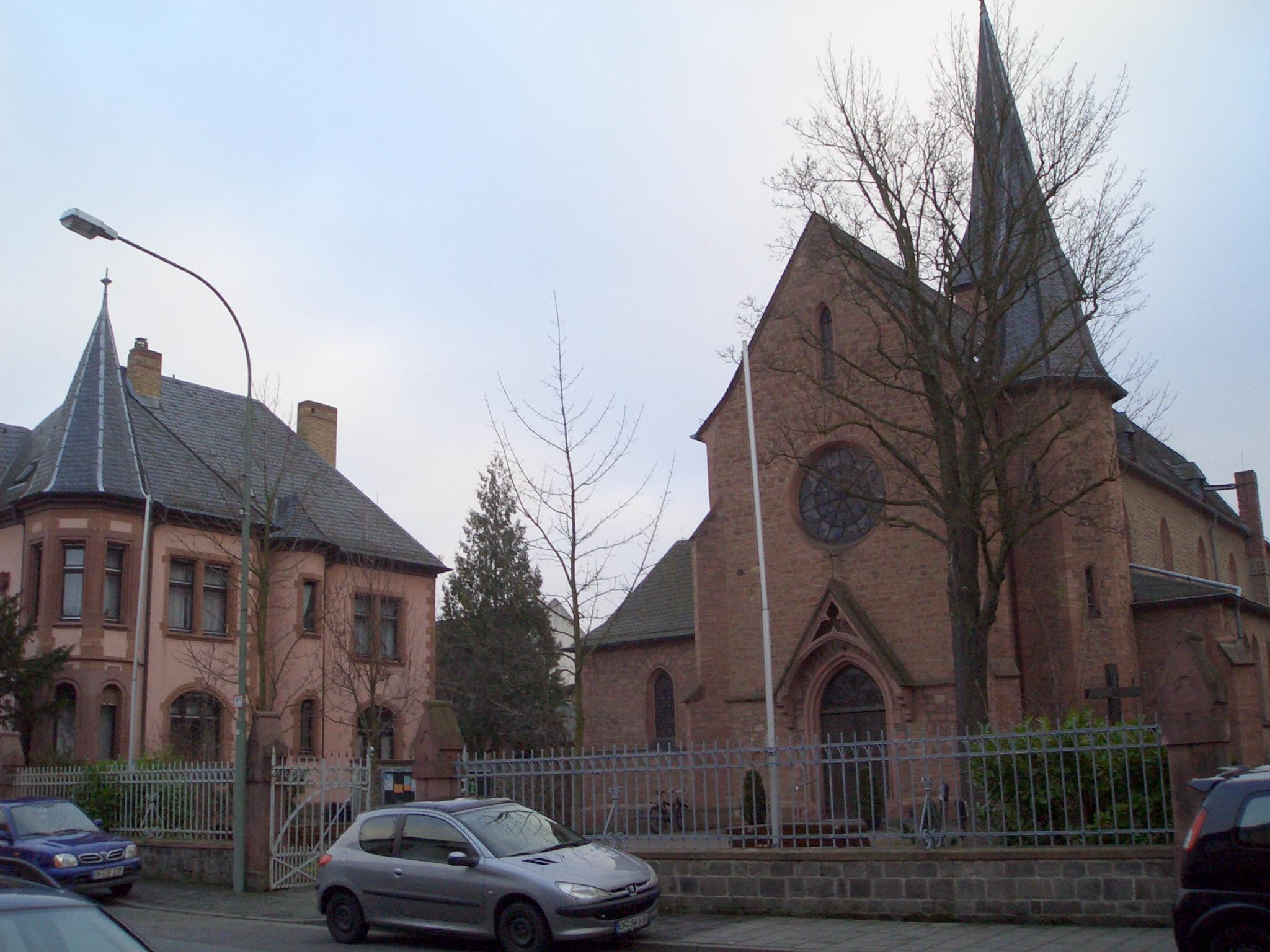 Kath-Kirche-Pfarrhaus20060121